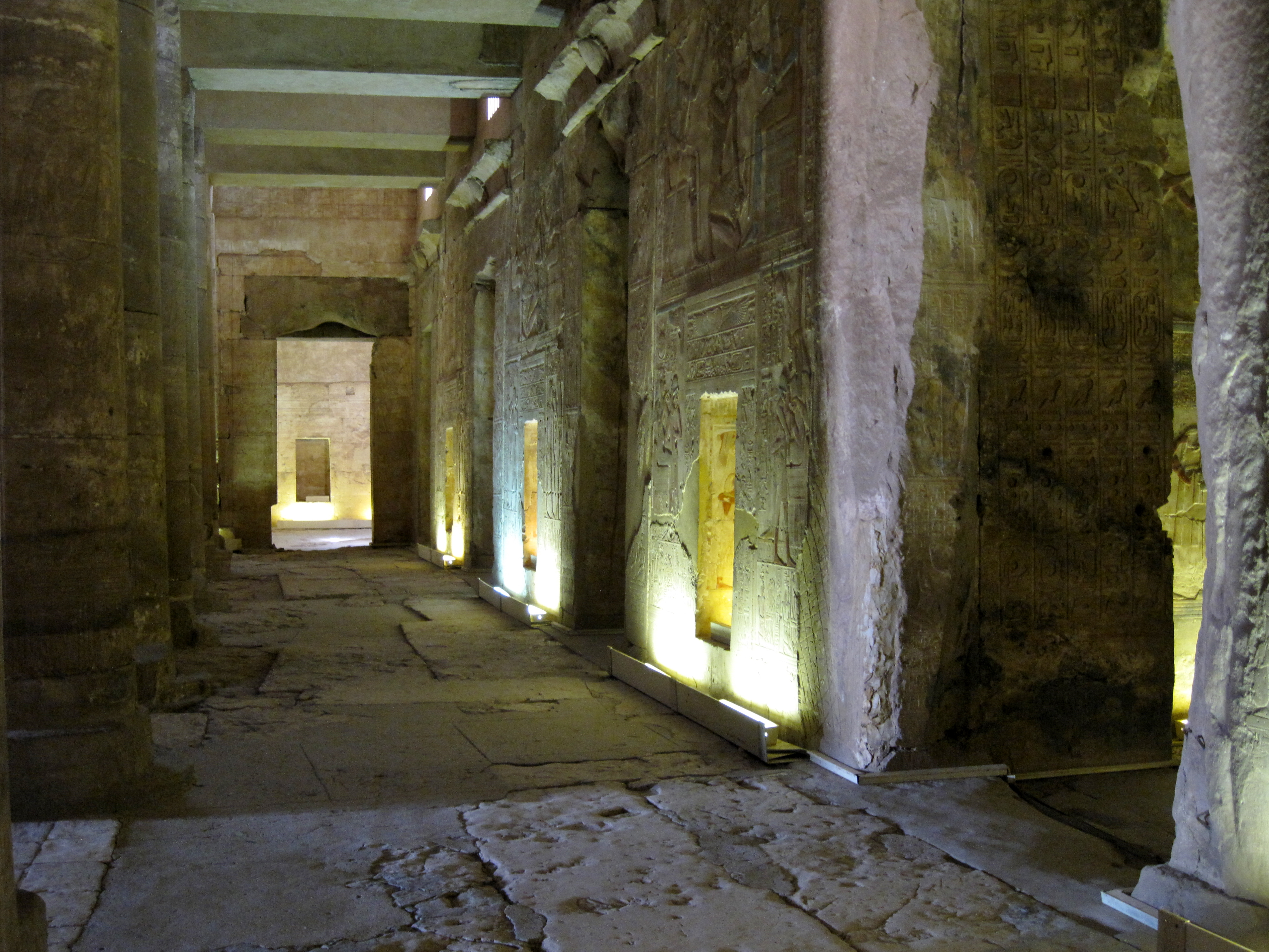 Eingänge zu den Heiligtümern in der zweiten Hypostylhalle im Totentempel Sethos I. in Abydos, Ägypten